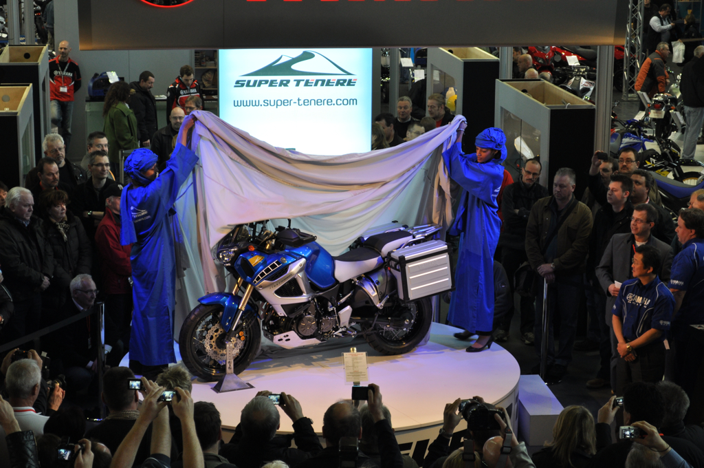 Für die TWIN Veranstaltungs GmbH realisierte medienrauschen zur Motorräder Dortmund das Weblog unter